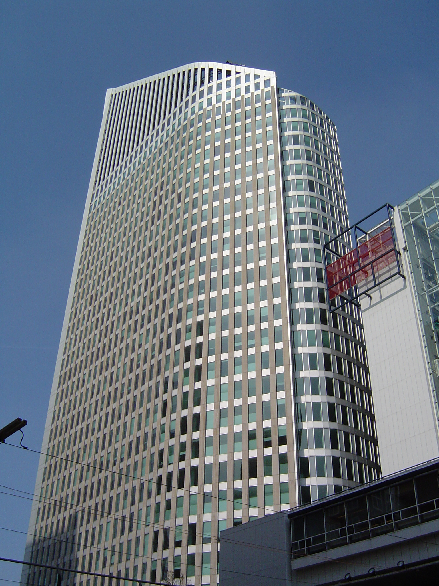 Ministerie van OCW, Den Haag, The Netherlands Made by Joris van Rooden on 17-04-2004